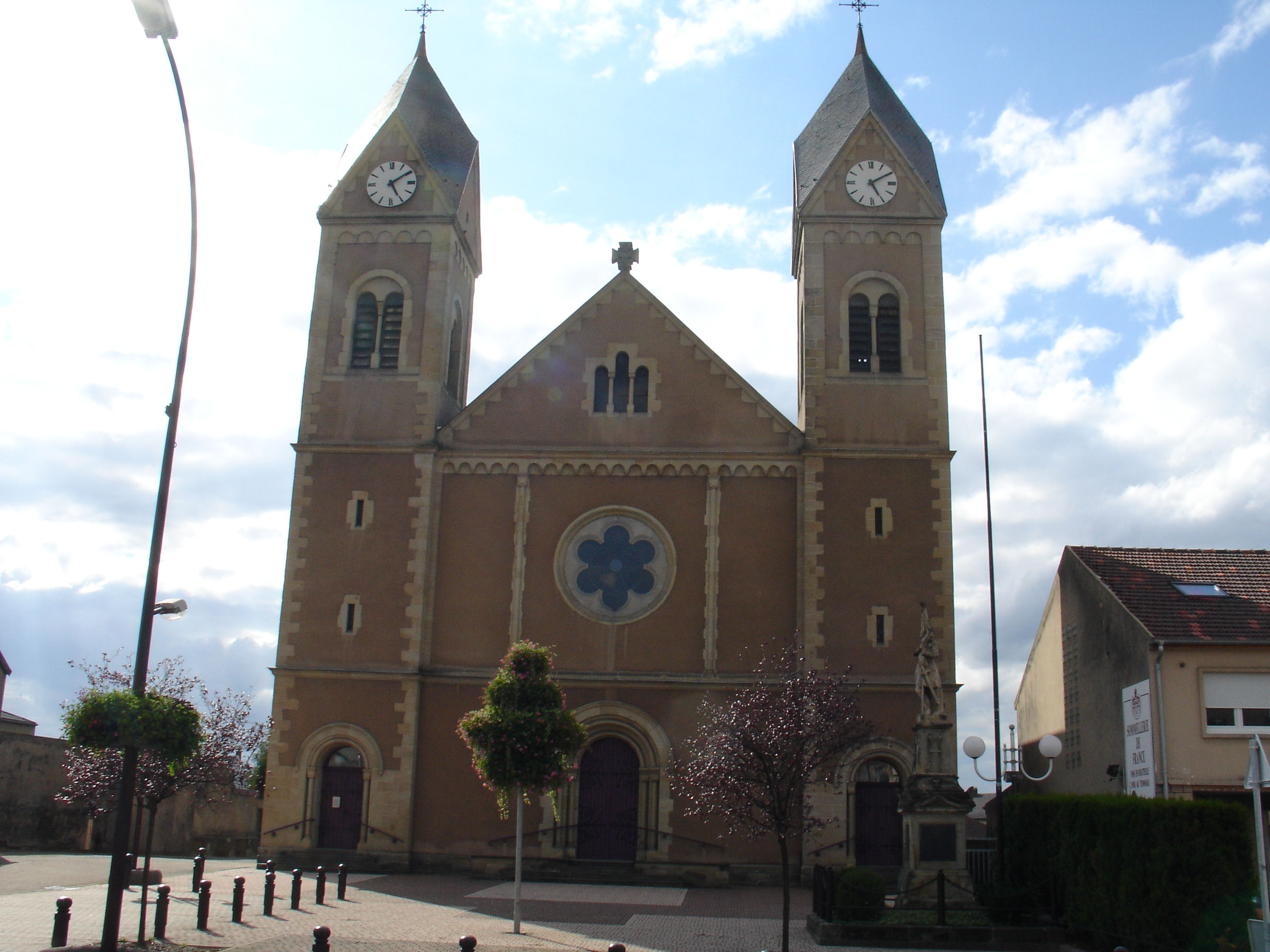 L'Église Saint-Gérard-Majella de Carling.